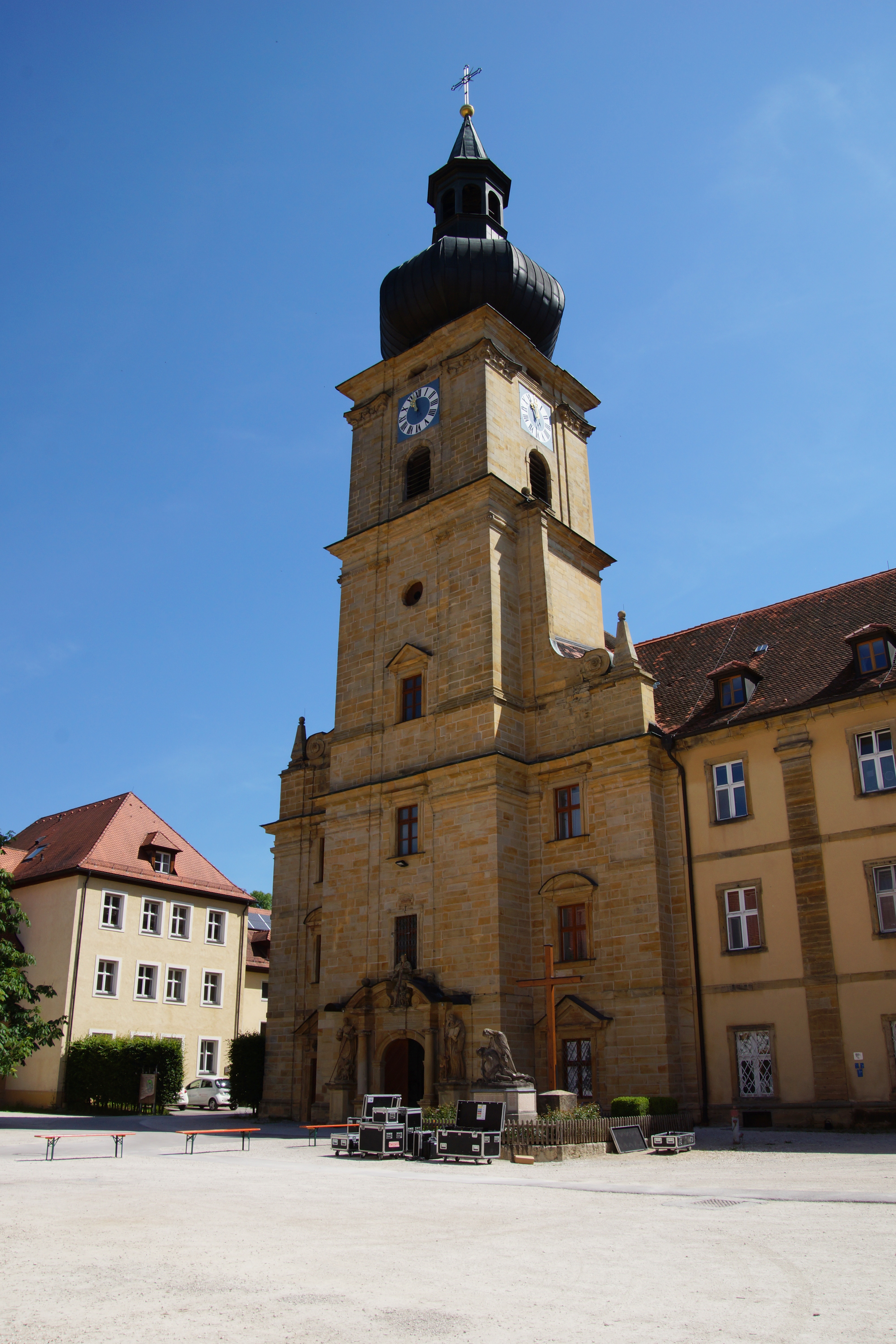 Die Klosterkirche St. Jakob im Oberpfälzischen Ensdorf